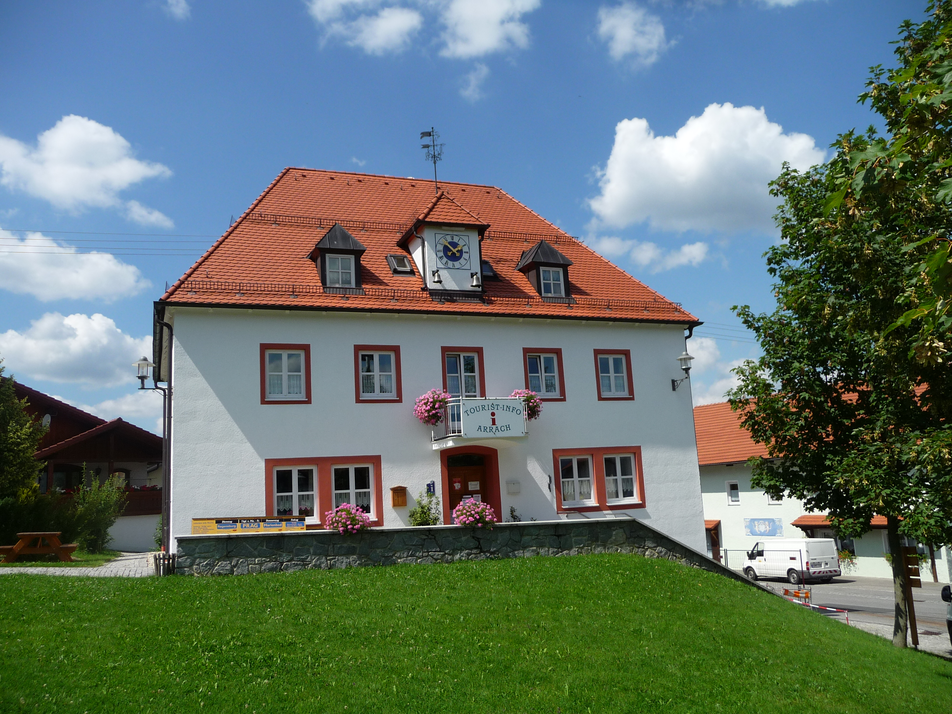 Das Haus der Tourist-Info auf dem Dorfplatz in Arrach